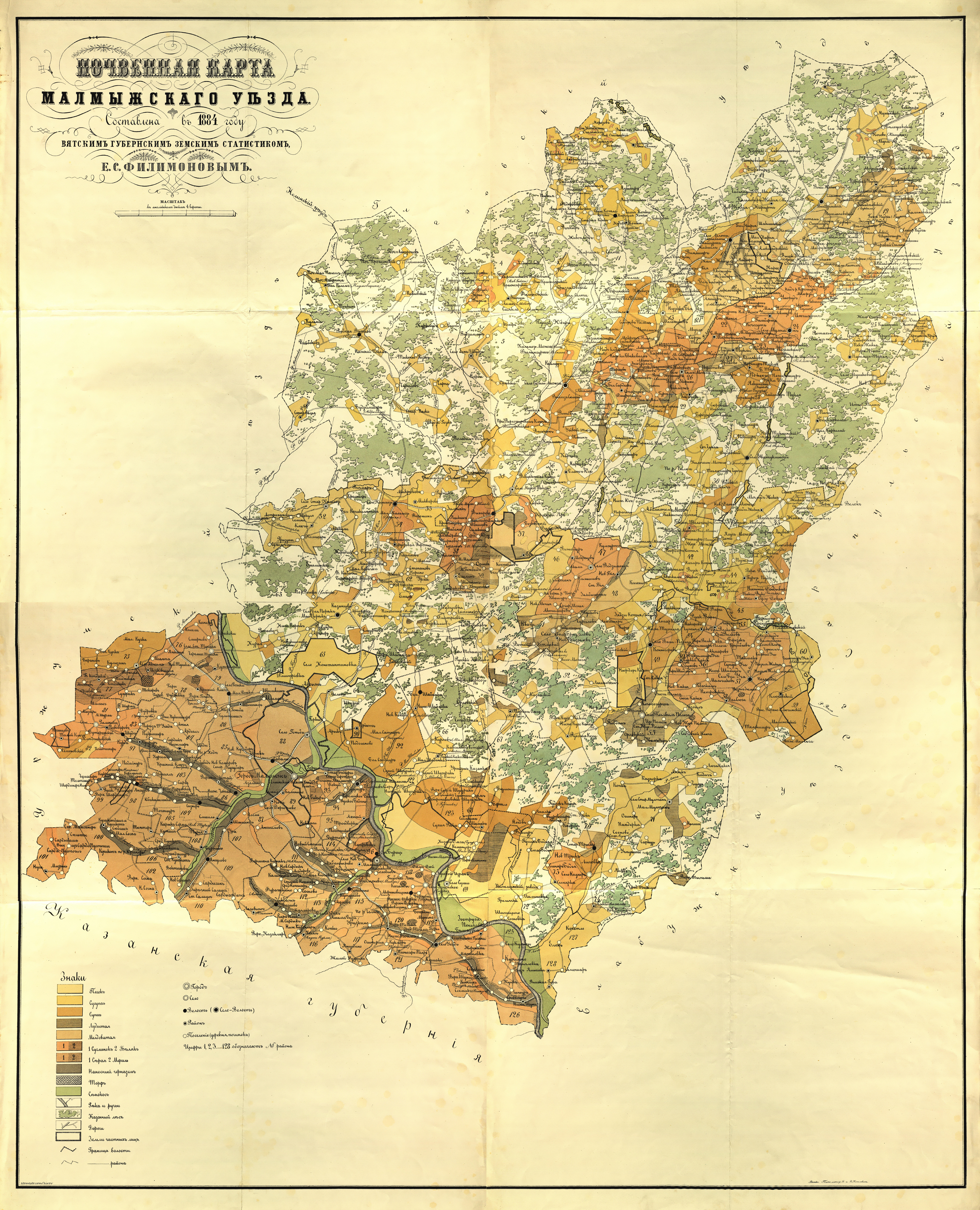 Почвенная карта Малмыжского уезда 1884 года